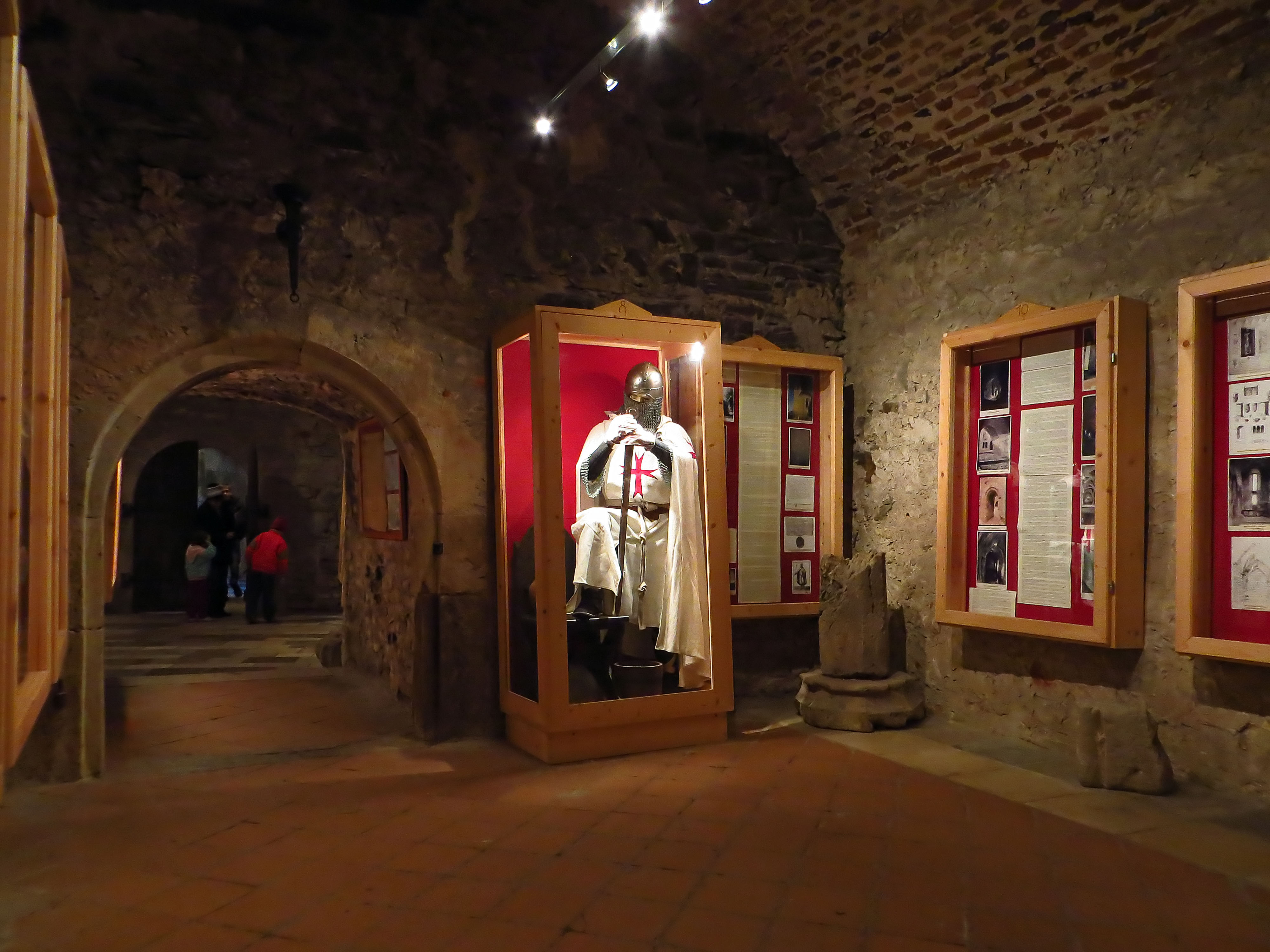 Burg Lockenhaus